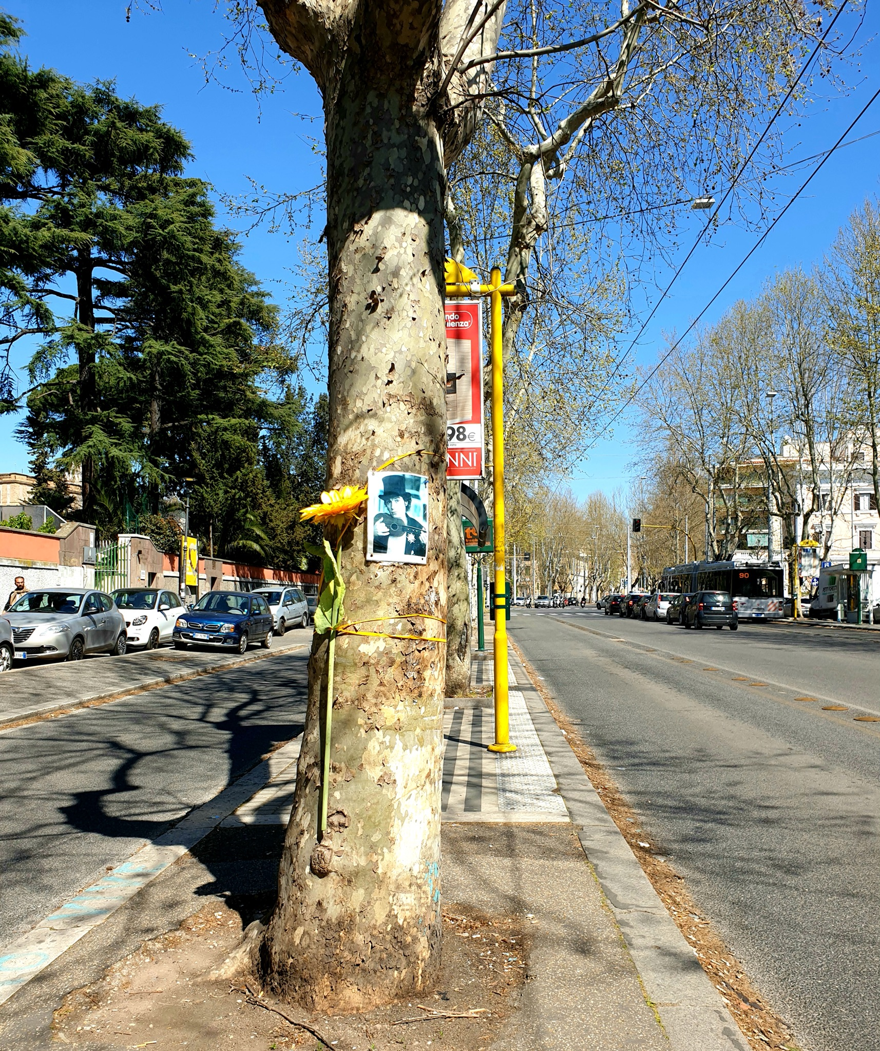 Albero sulla Via Nomentana a Roma, su cui perse la vita Rino Gaetano, fotografato nel 2019